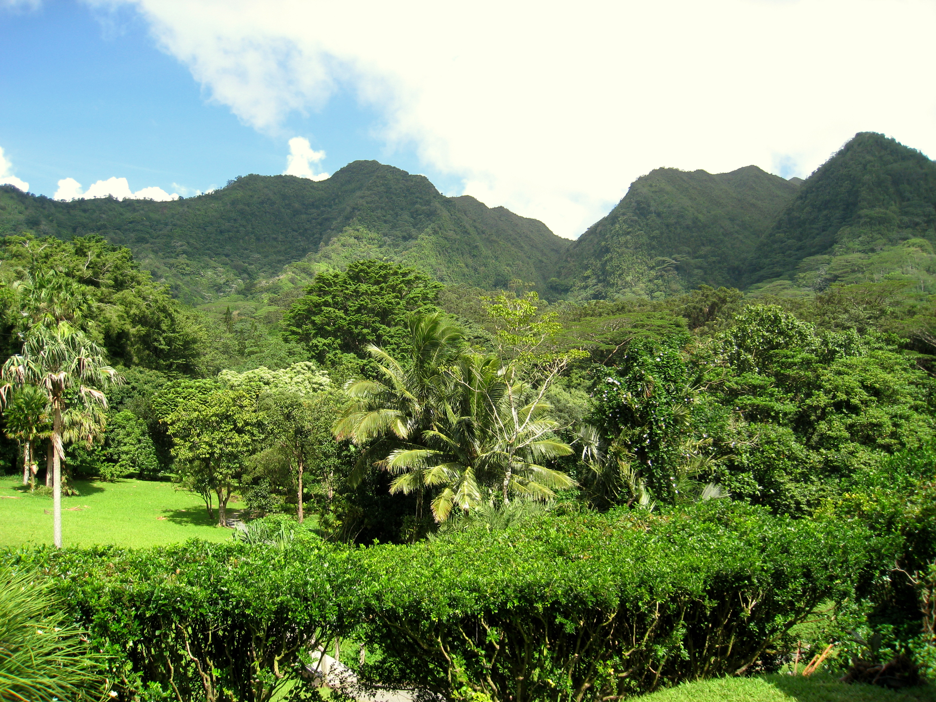 Lyon Arboretum, Oahu, Hawaii, USA - general view.